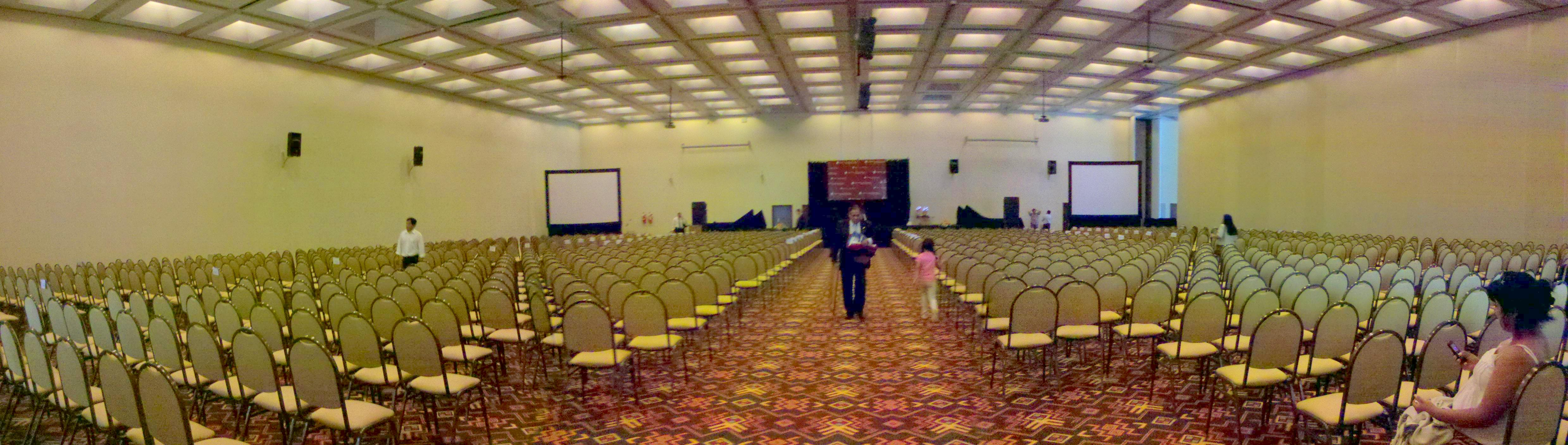 Centro de Convenciones de Salta (Argentina).